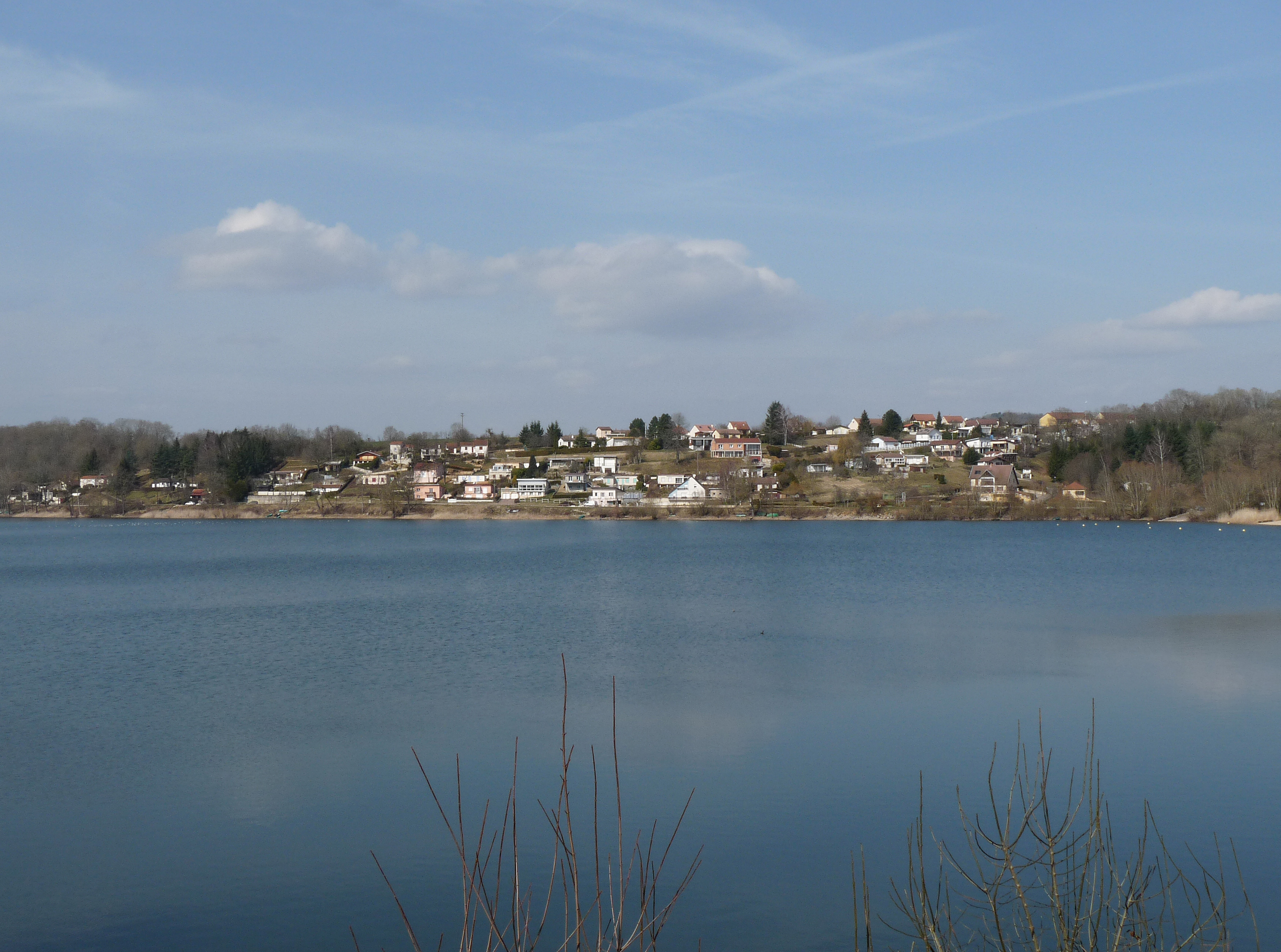 Lac de Charmes (Haute-Marne)